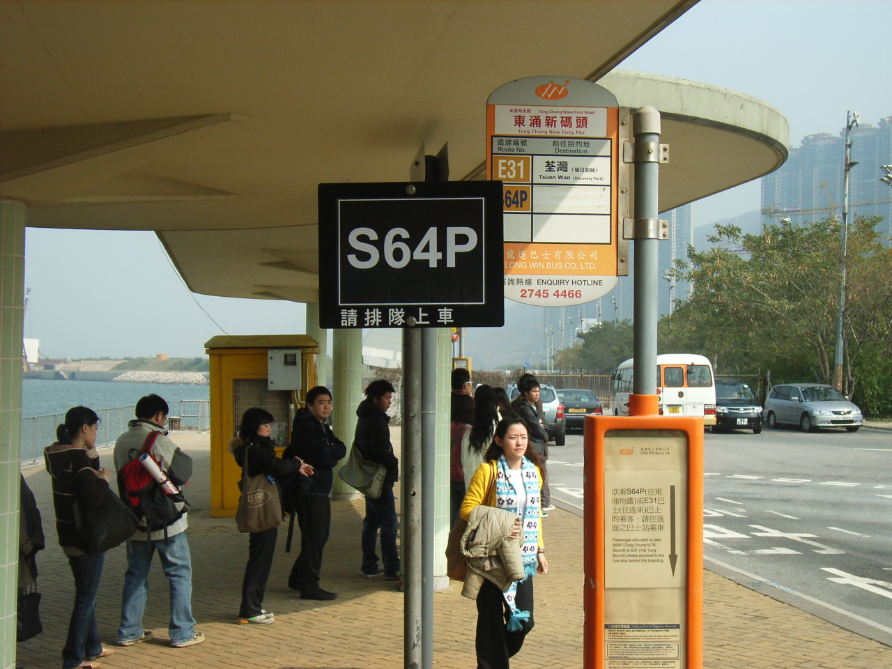 東涌海濱路 (Tung Chung Waterfront Road)，是zh:香港zh:離島zh:大嶼山北部沿海的一條zh:街道，主要是行車道，前身是新zh:填海區。 東涌海濱路東至zh:迎禧路，西至zh:順東路及赤臘角南路交匯處。 東涌海濱路之中途，經過zh:北大嶼山快速公路行車zh:天橋、東涌發展碼頭、渡輪碼頭旁之zh:的士站、巴士站、海堤灣畔第三期、惠東路及zh:行人天橋及zh:怡東路止。 Photographic and author: User:TUNGTUNG360